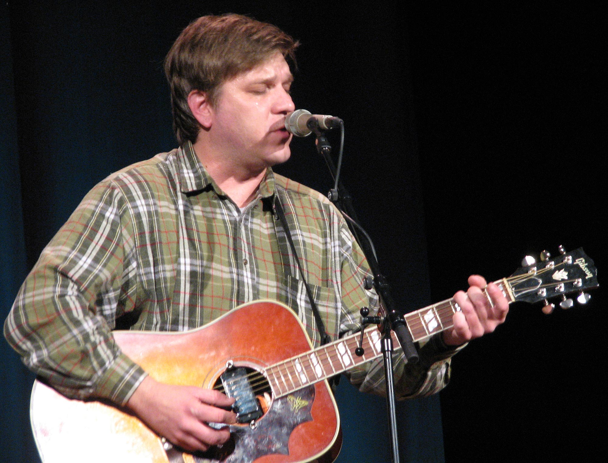 David Dondero in Örebro, Sweden